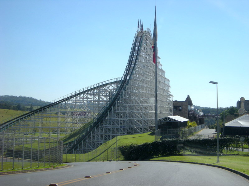 Vista da Montanha-Russa do Parque Temático Hopi Hari, localizado em Vinhedo, no interior do Estado de São Paulo